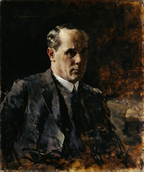 Selbstbildnis 1925